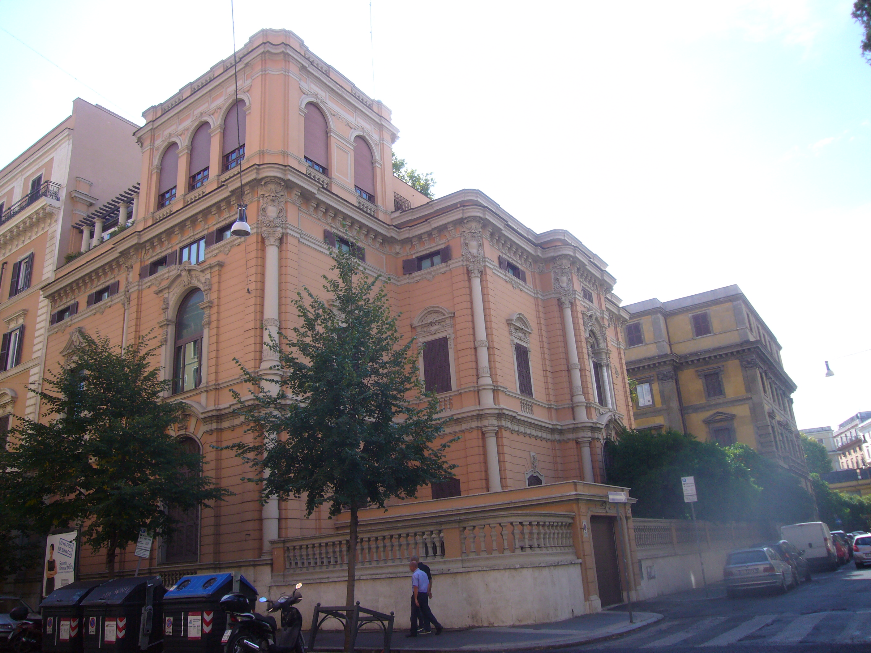 Roma, via Boncompagni angolo via Nerva. Villino Levi